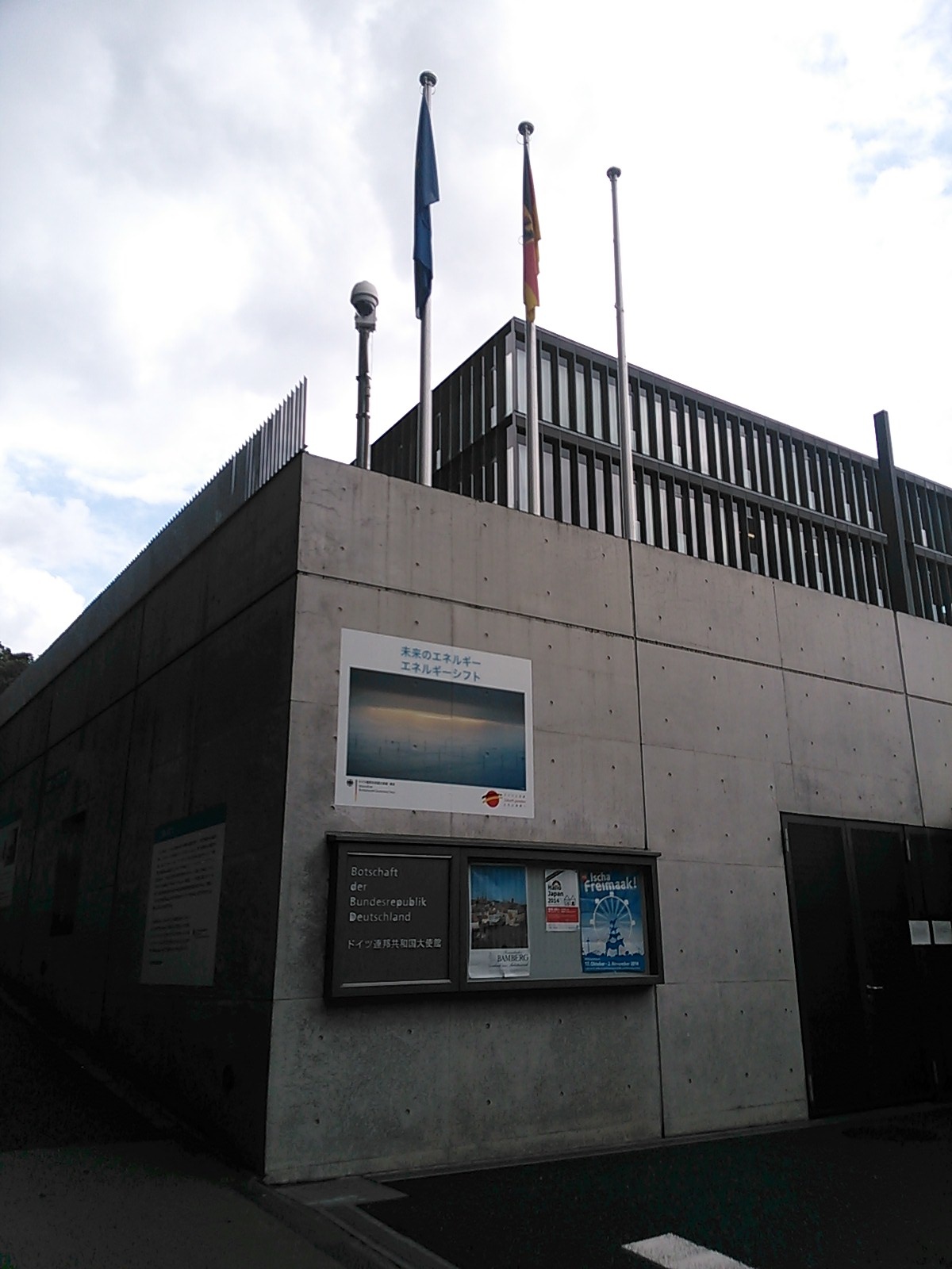 東京都港区南麻布、駐日ドイツ大使館